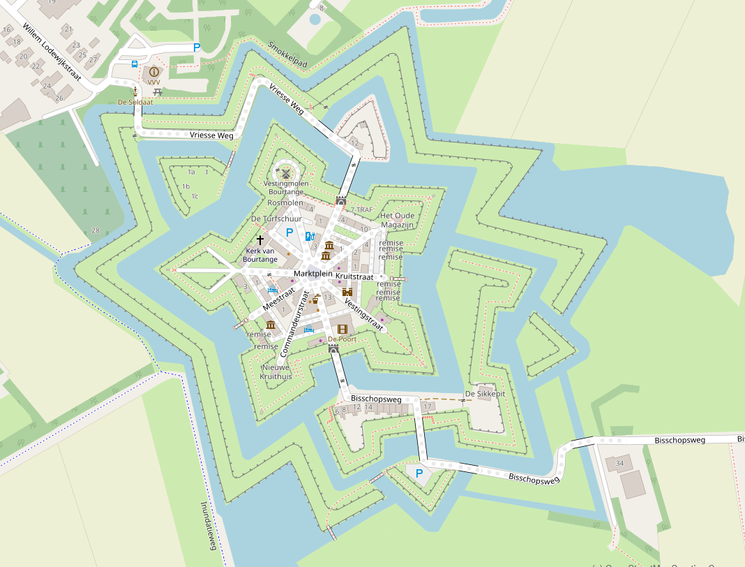 Aufnahme von Festung und ihrem nächsten Vorfeld